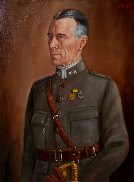 Oljemålning föreställande Överste Per Falk, Chef för Norrbottens artillerikår (A 5), Boden, 1/1 1928-16/10 1931. Chef för Gotlands artillerikår (A 7) 1931-1934, Chef för Norrlands artilleriregemente (A 4) åren 1934-1939.